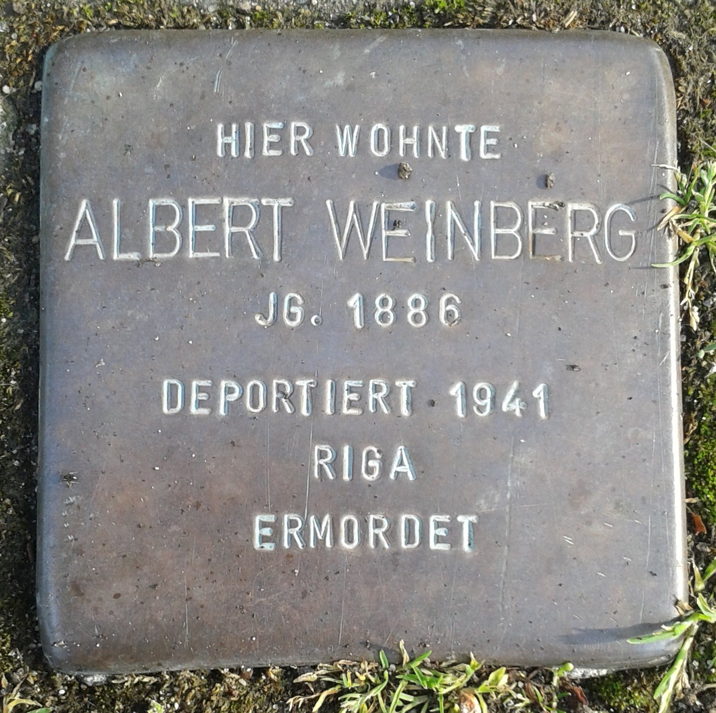 Stolperstein Selm Bahnhofstraße 37 Albert Weinberg